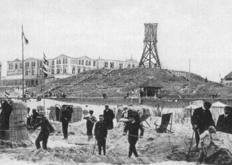 Dünenhügel mit Bake an der Stelle des späteren Café Pudding